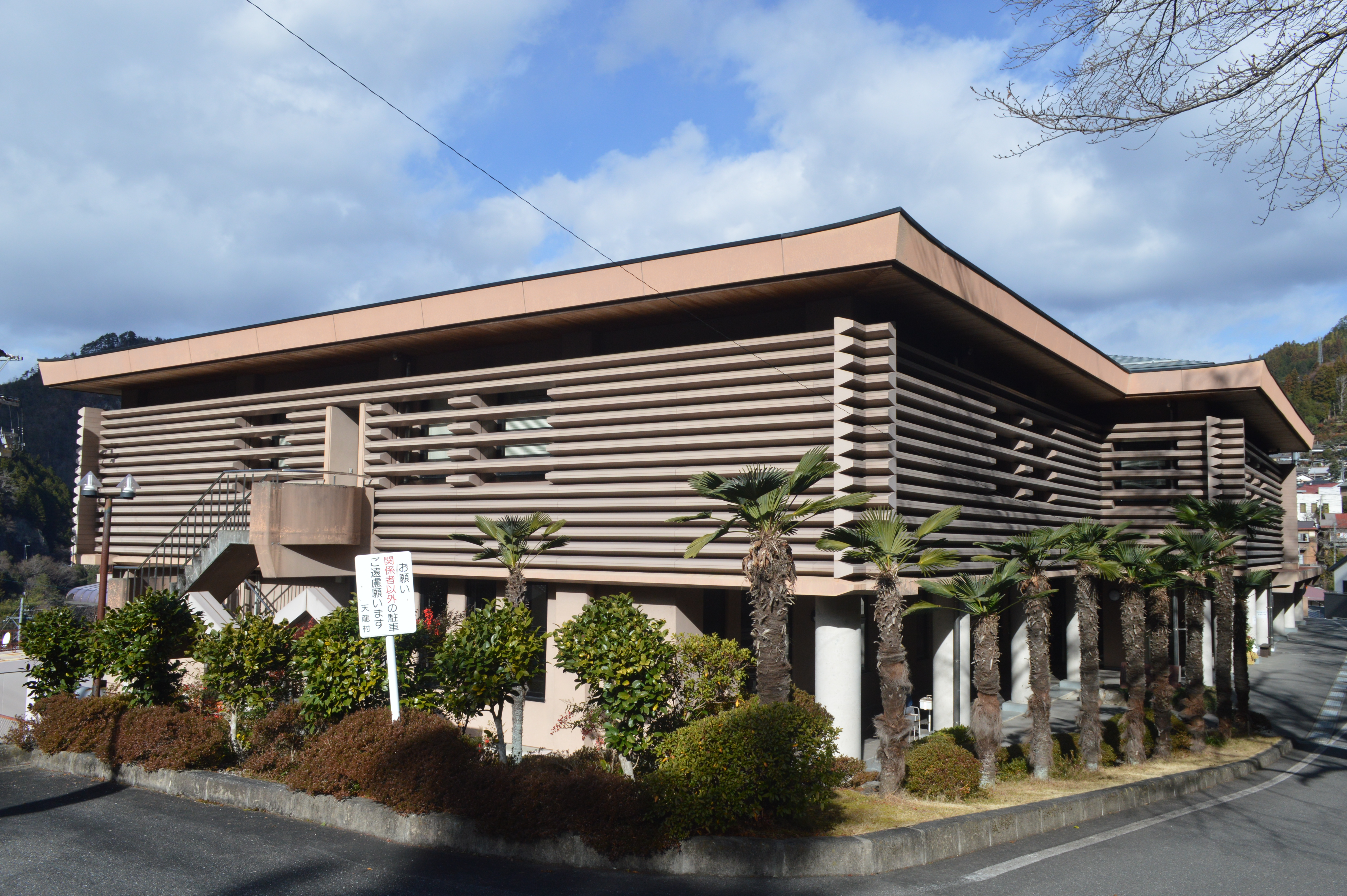 長野県下伊那郡の天龍村文化センター「なんでも館」。天龍村図書館などが入っている。